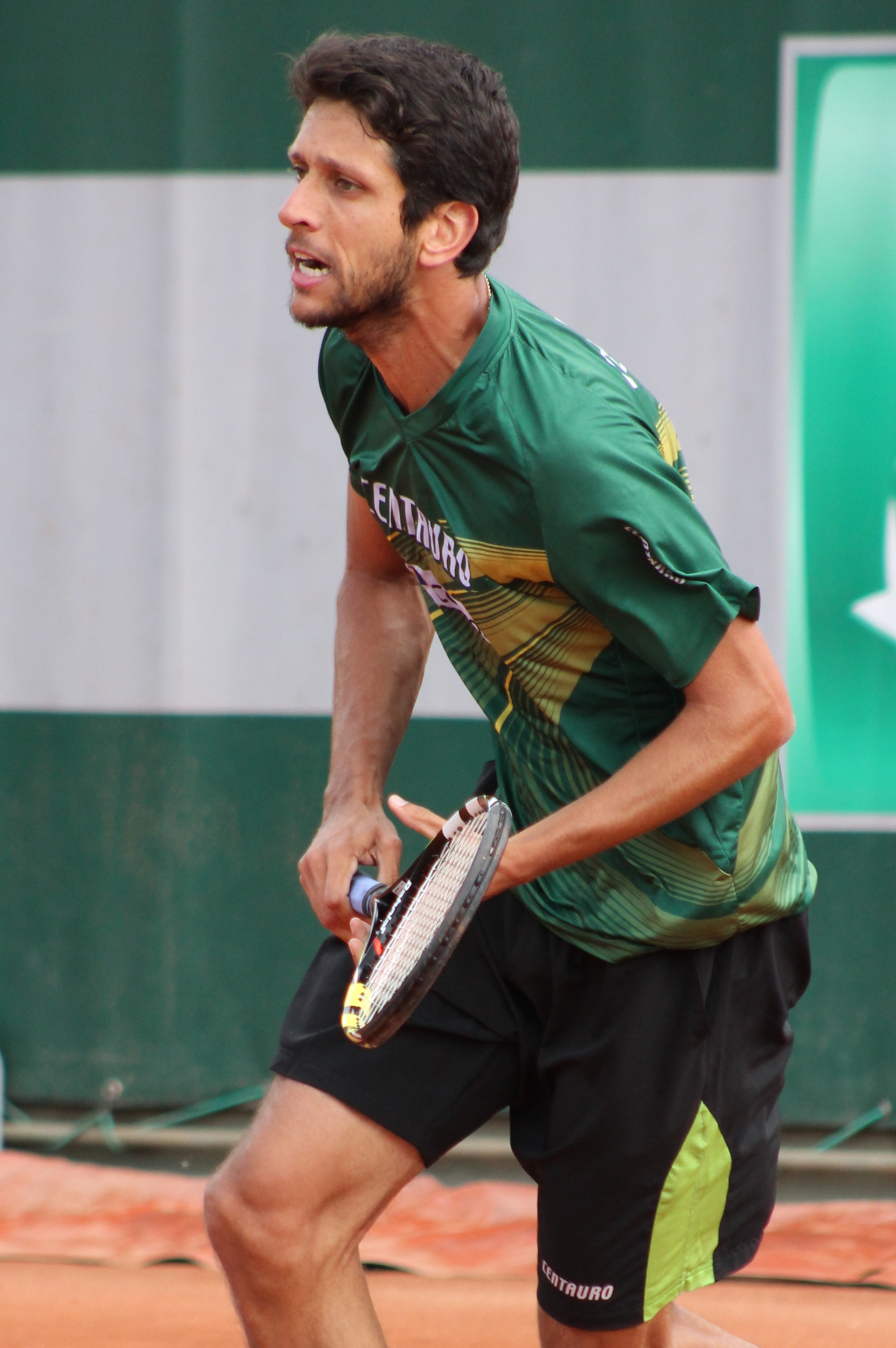 Melo RG15 (5)